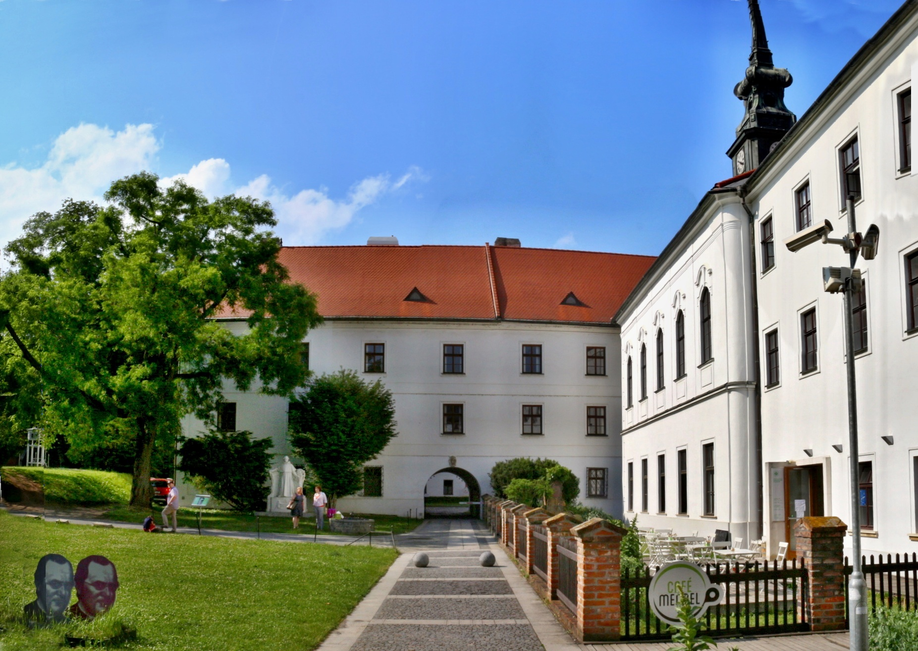 Starobrněnský klášter